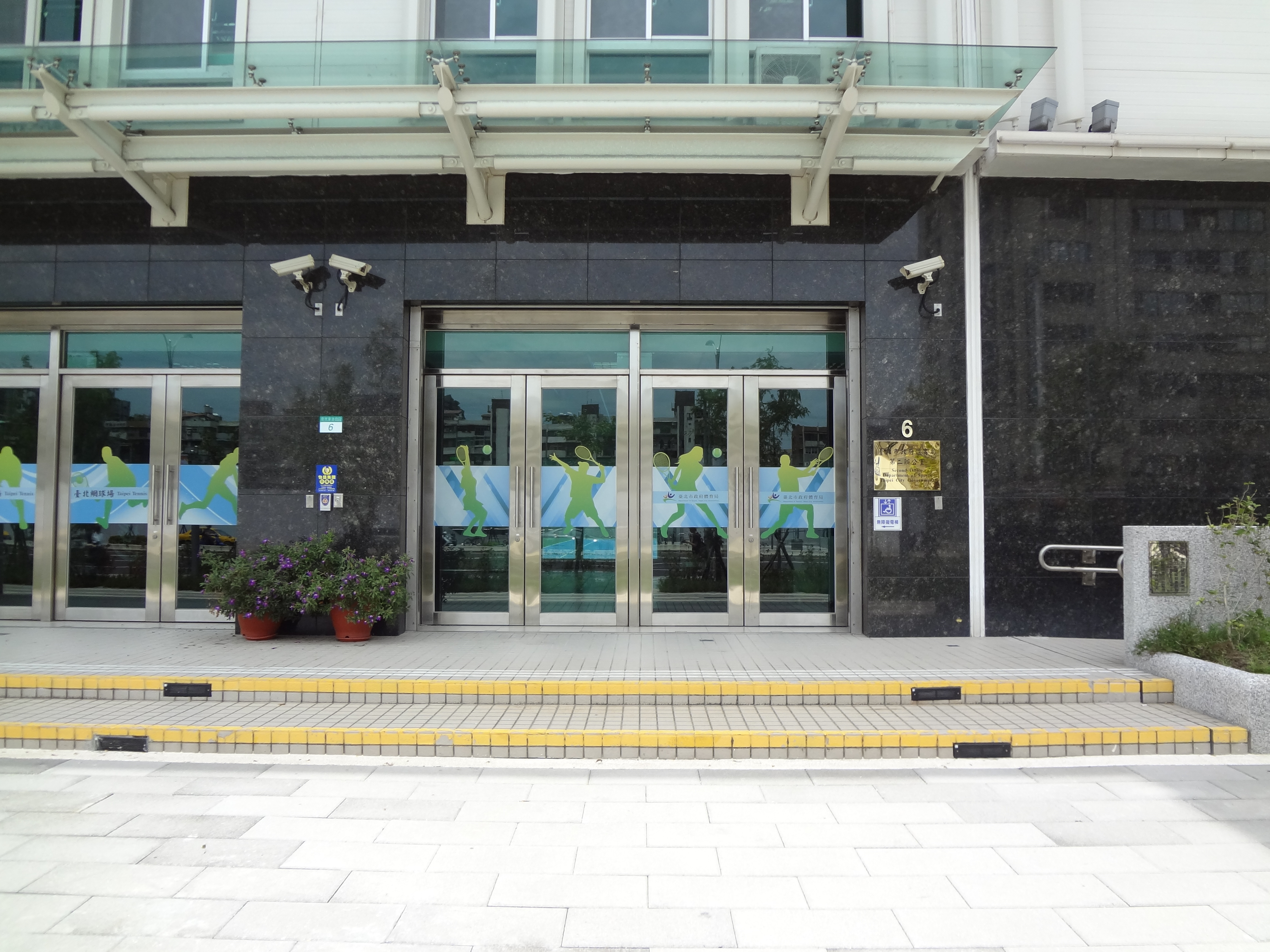 臺北市政府體育局第二辦公室，位於臺北市松山區南京東路四段6號（臺北網球場）。